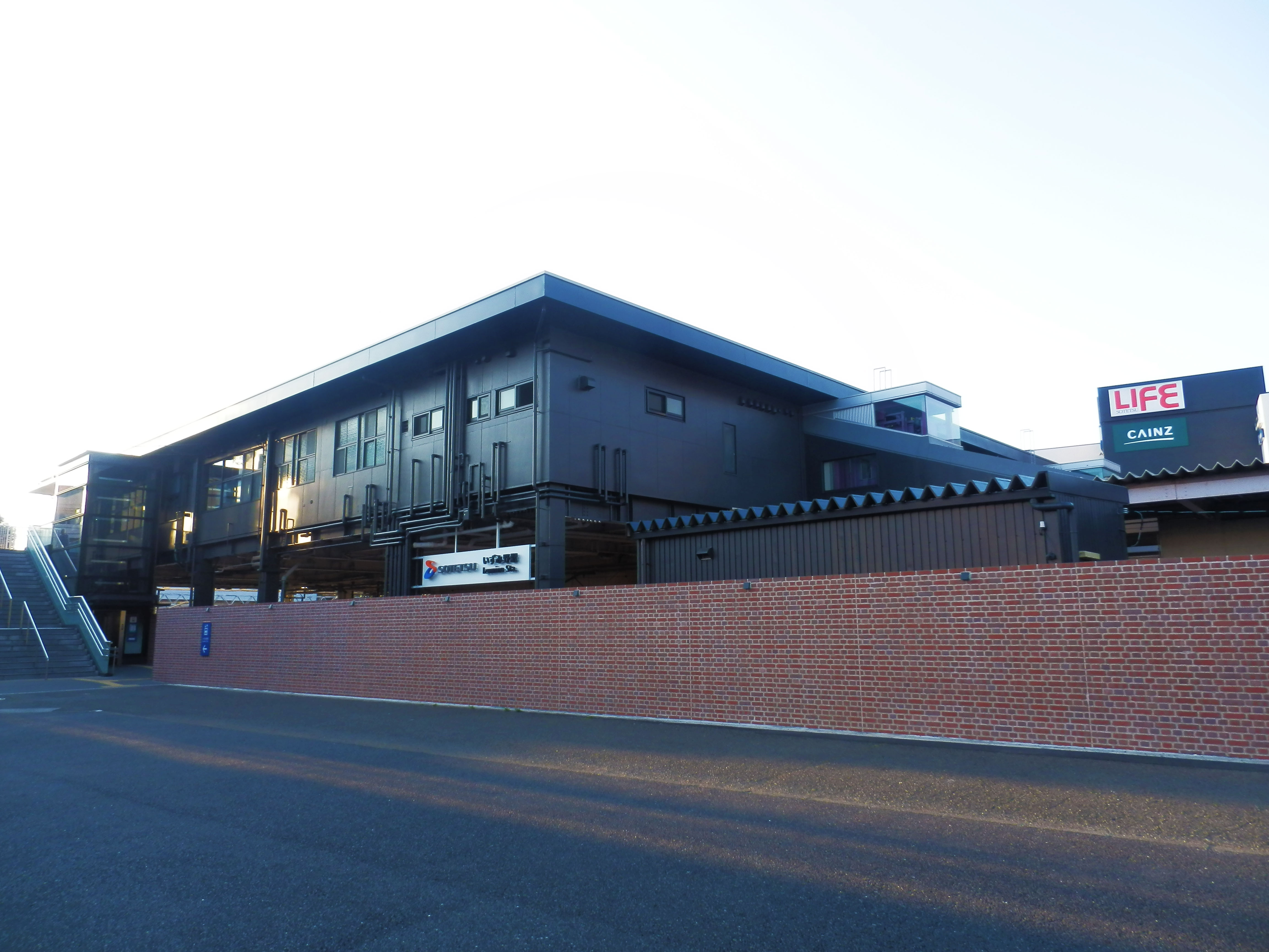 いずみ野駅（リニューアル後）